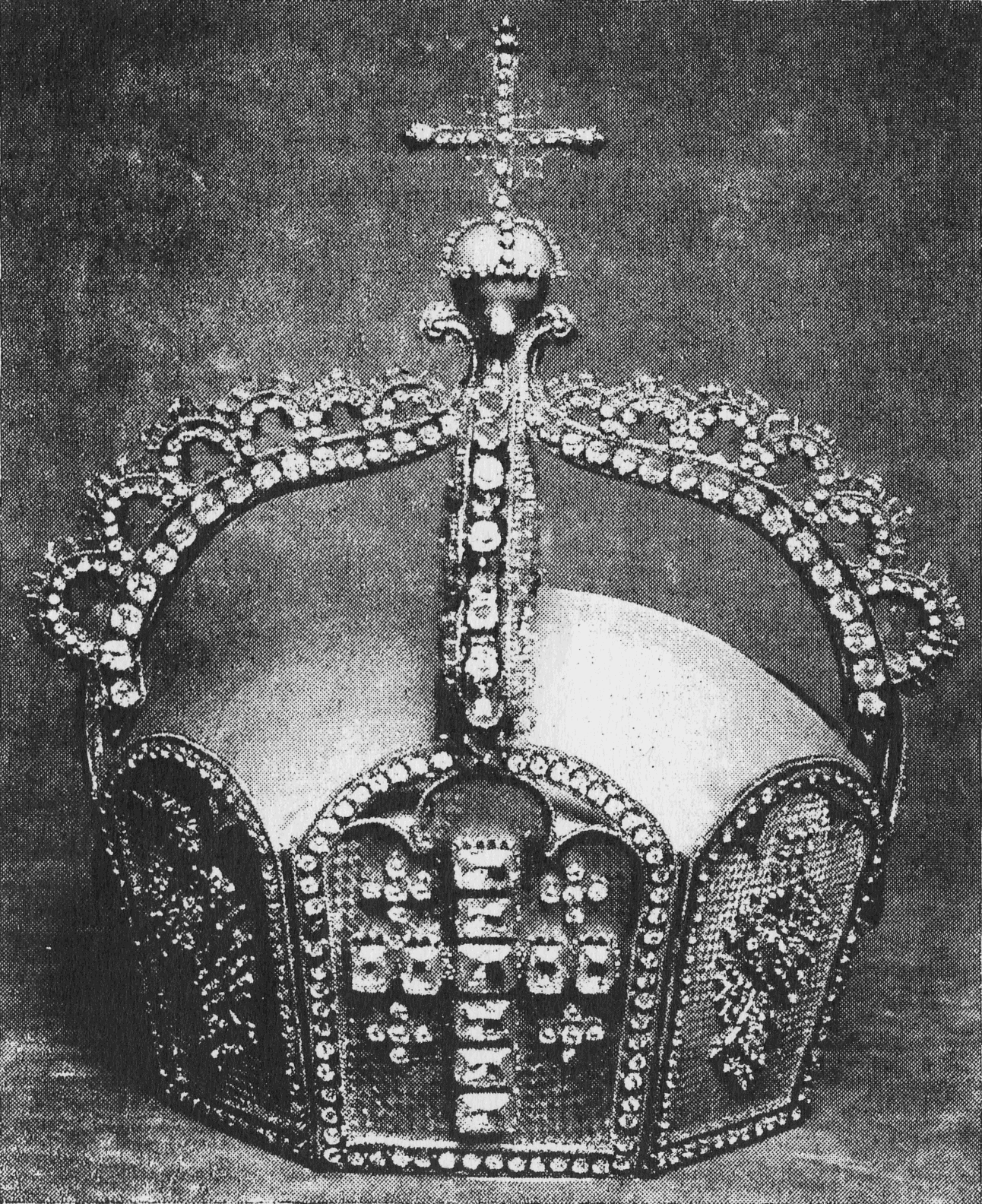 Krone des Preußisch-Deutschen Kaisers. Photographie des Holzmodells von 1872, bis 1940 ausgestellt in Schloss Monbijou, Berlin. Verbleib des Modells unbekannt.